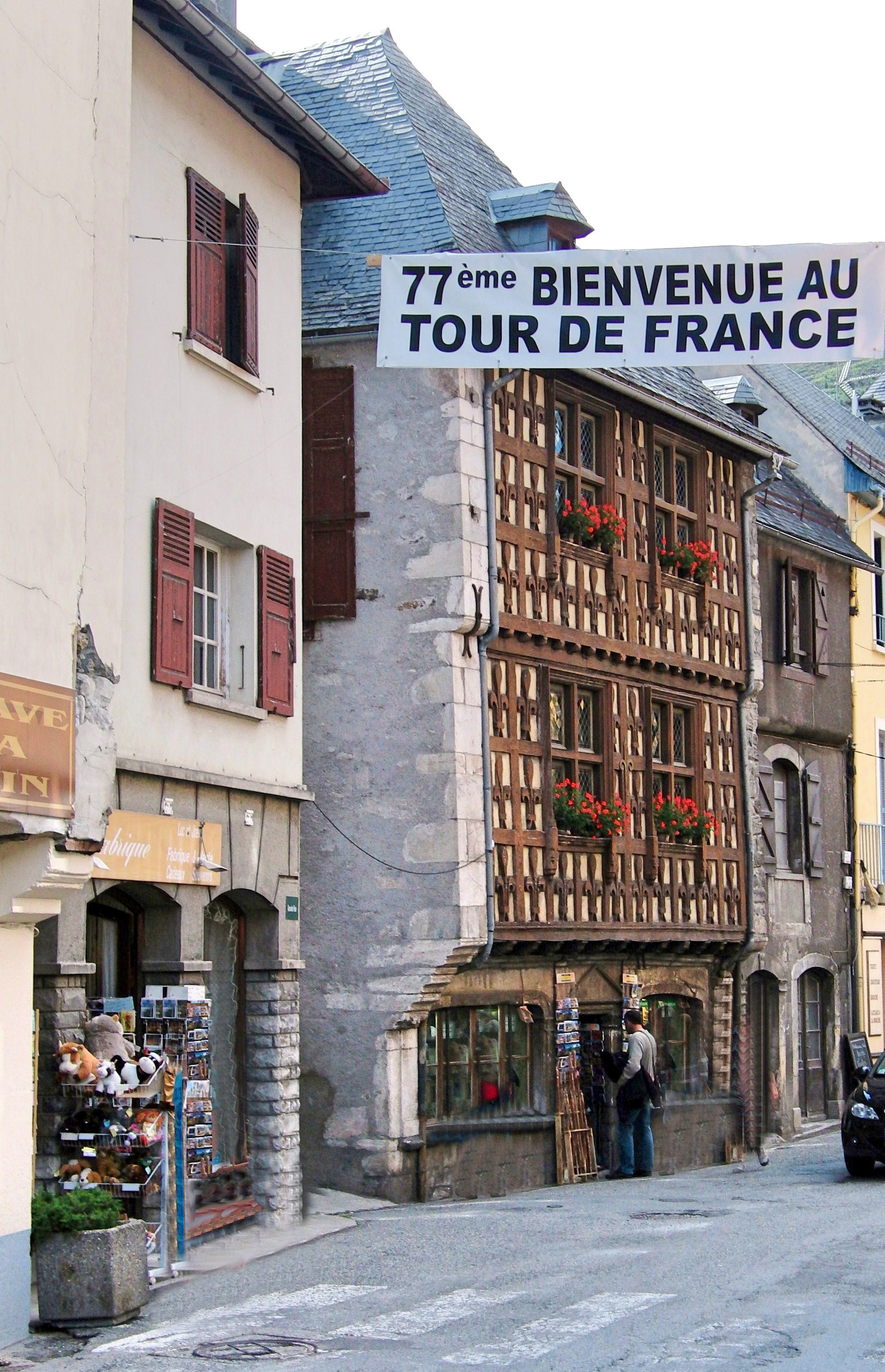 La Maison des Lys Arreau Hautes-Pyrénées.- It is indexed in the Base Mérimée, a database of architectural heritage maintained by the French Ministry of Culture, under the references PA00095321 and IA65000269 .